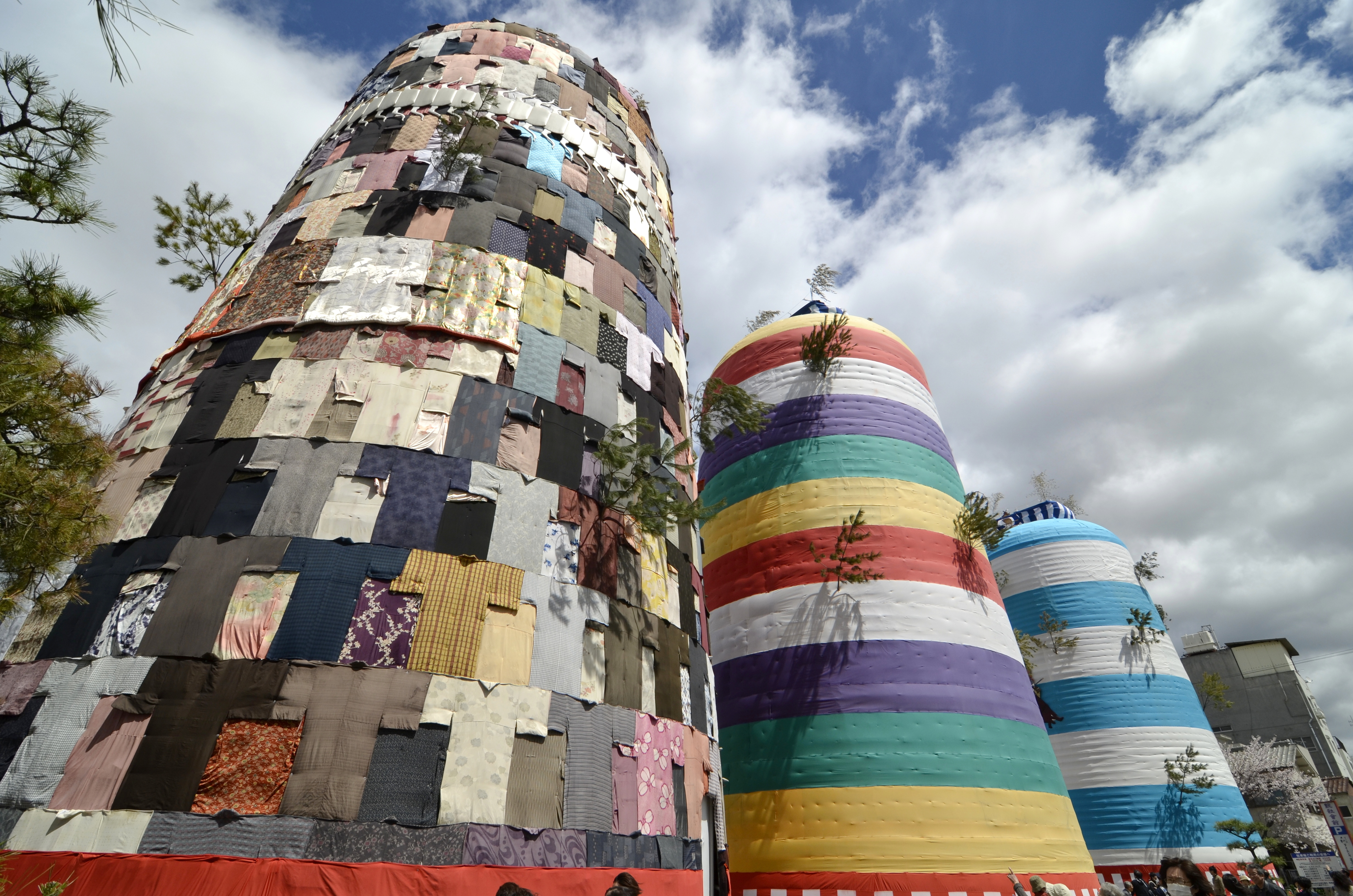 射楯兵主神社 三ツ山大祭